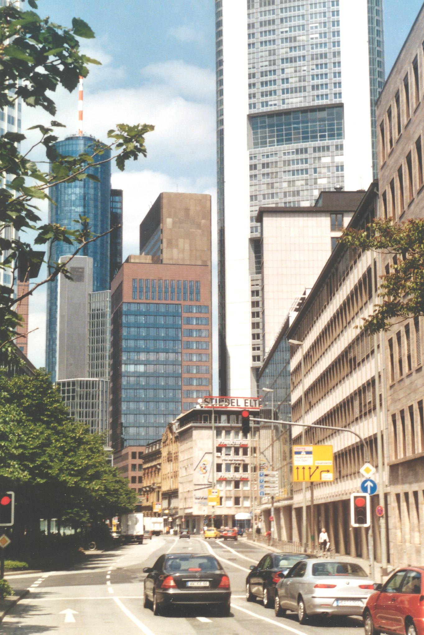 Frankfurt am Main. Kurt Schumacher Strasse. May 2005.Neue Mainzer Straße, near Willy-Brandt-Platz --T.h. 23:41, 25 February 2007 (UTC)